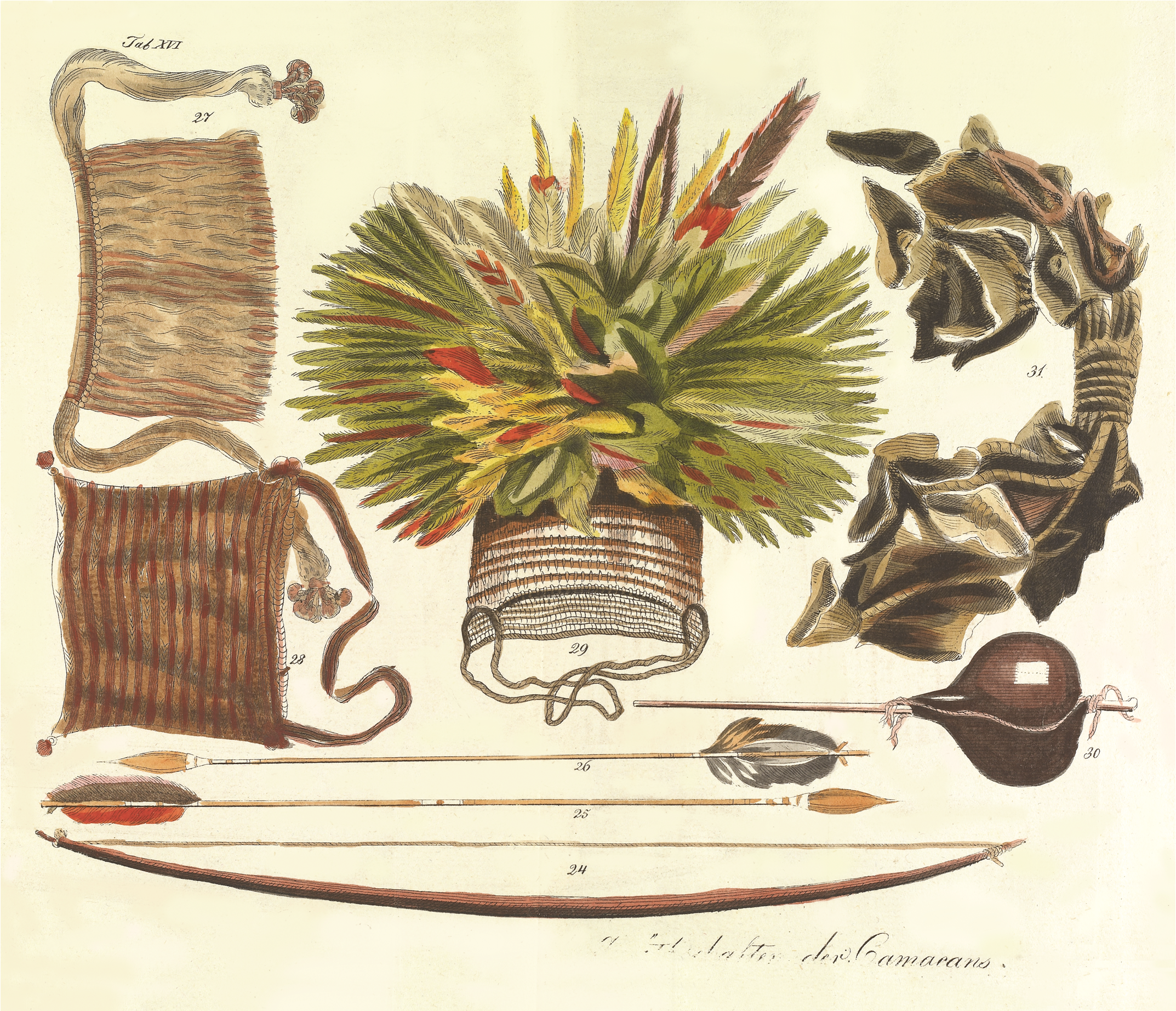 Ornamentos, utensílios e armas dos índios Camacãs